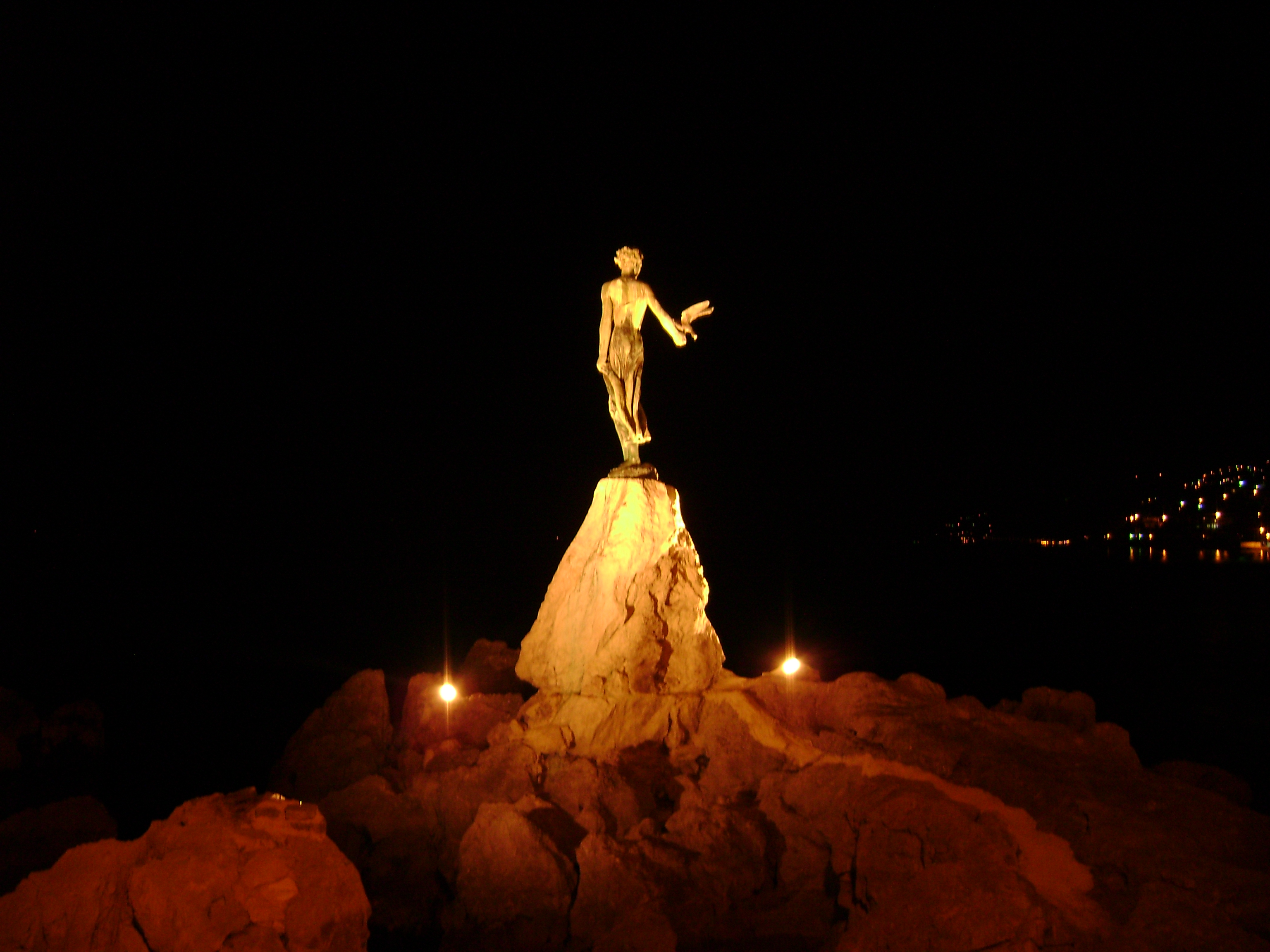 Djevojka s galebom,simbol Opatije